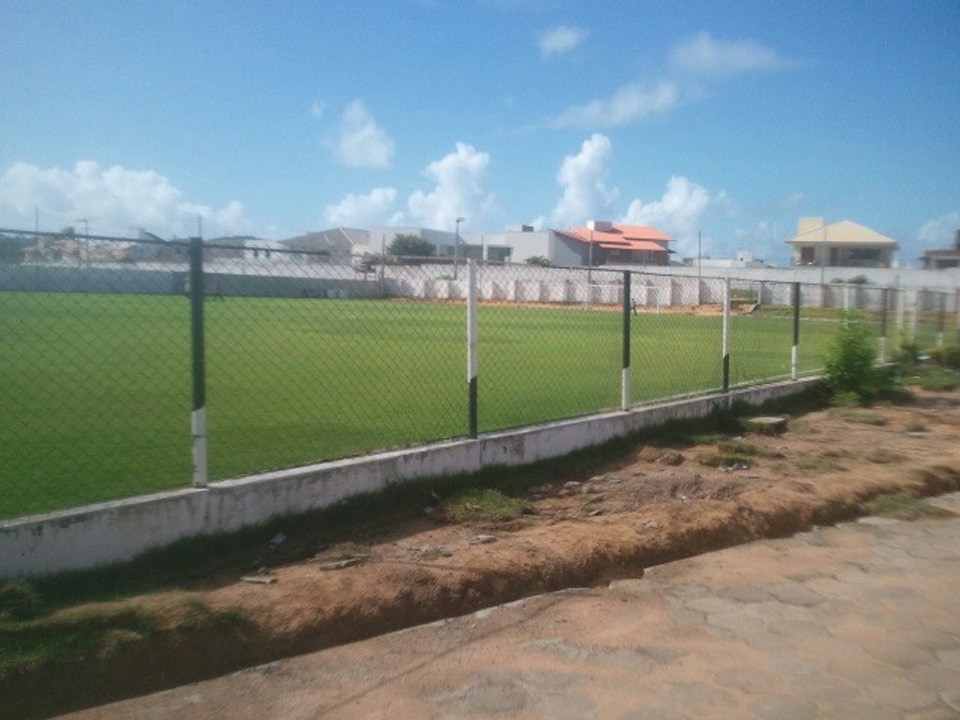 Centro de Treinamento profissional do ABC Futebol Clube